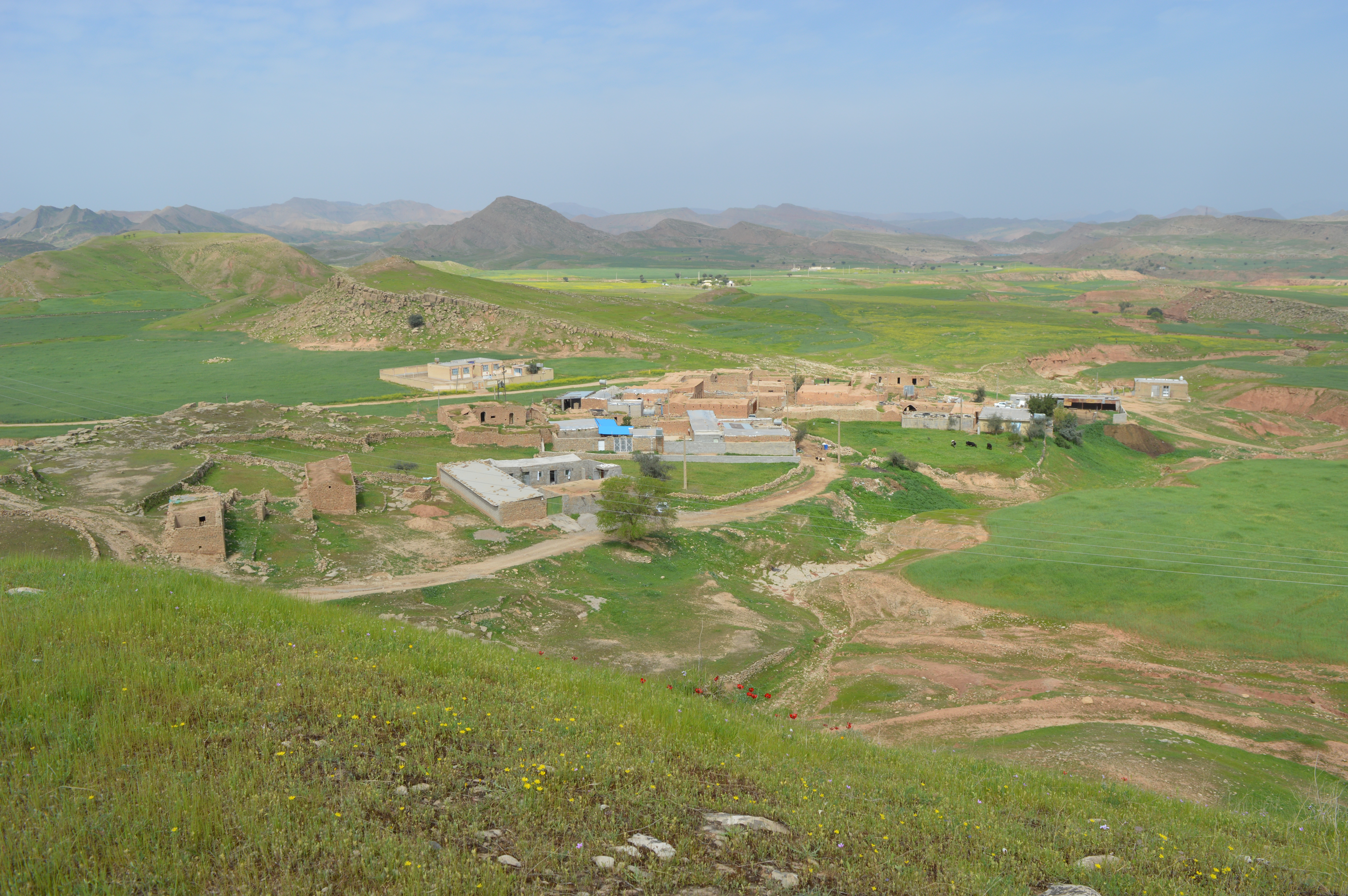 نمای روستا